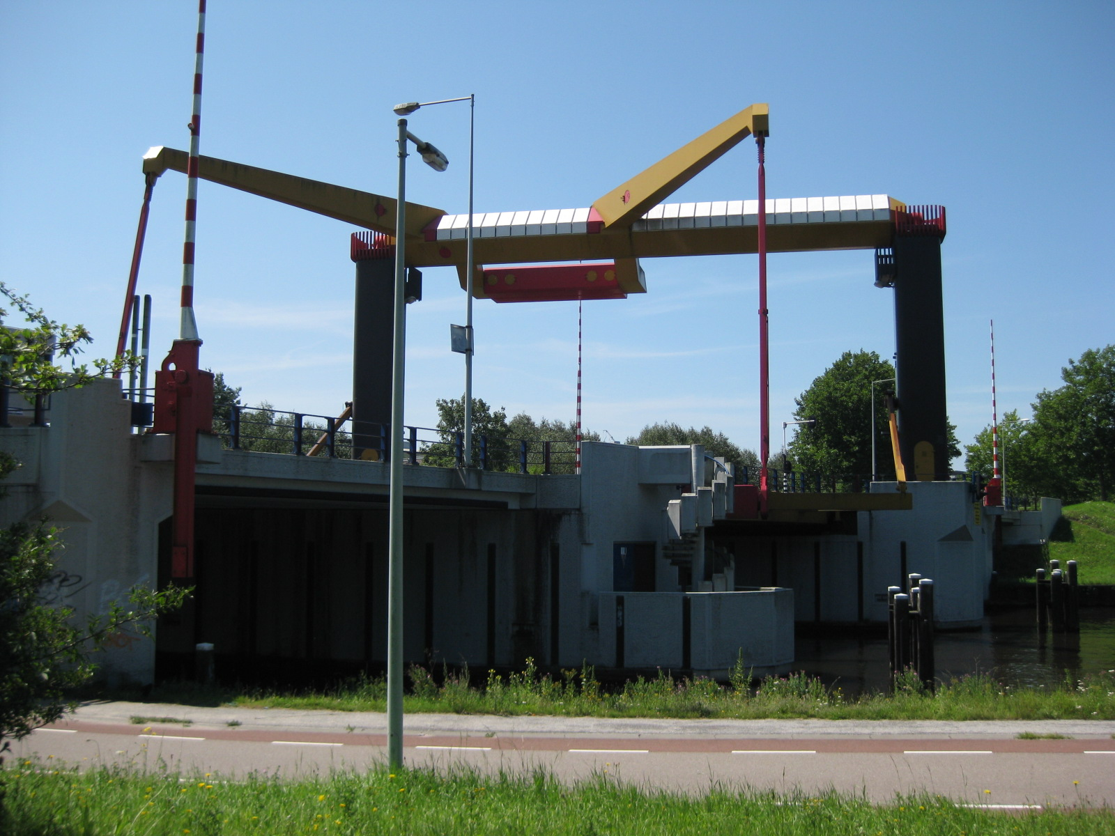 IJdoornlaanbrug over het Noordhollandsch Kanaal in Amsterdam. Cluster Oosterdoksdraaibrug.